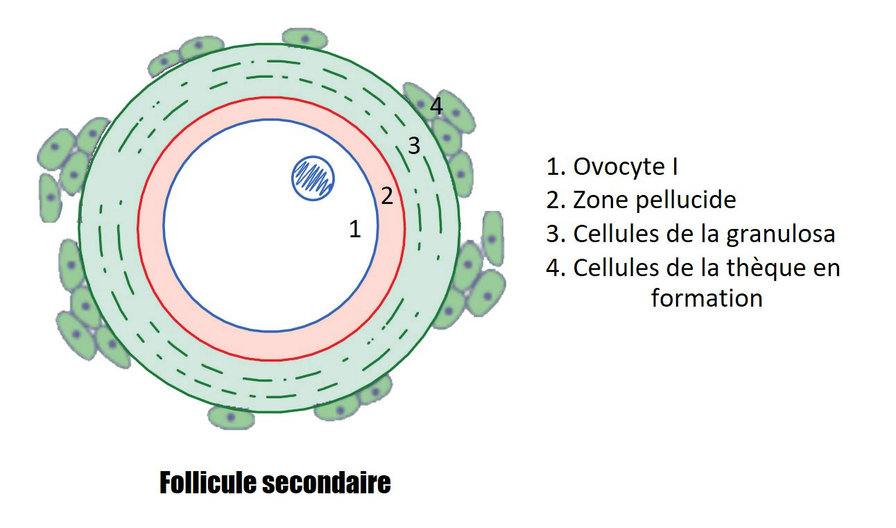 Follicule secondaire avec ovocyte I, zone pellucide, thèque, granulosa. Par J. GOY-MARTIN